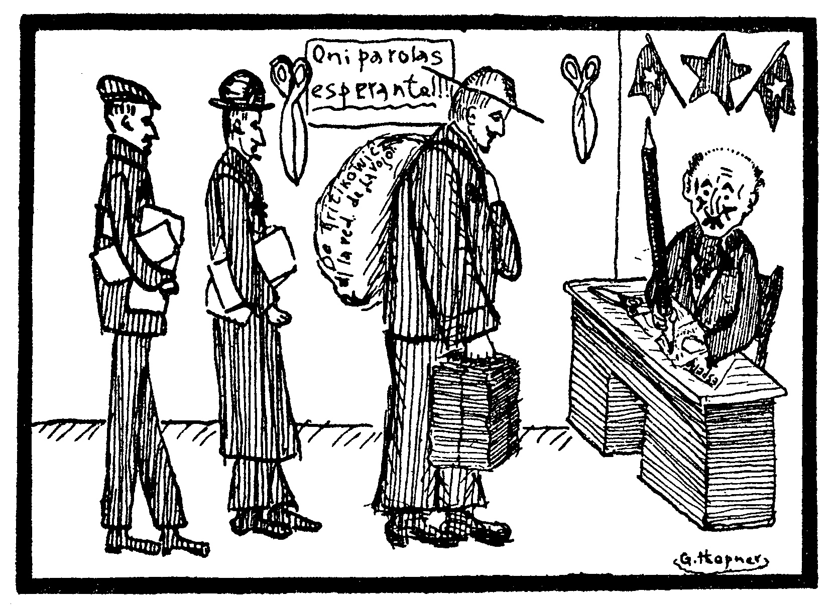 Ilustraĵo el Babiladoj de Bonhumora Zamenhofano de Jakobo Ŝapiro; desegnis Gerŝom Hepner.